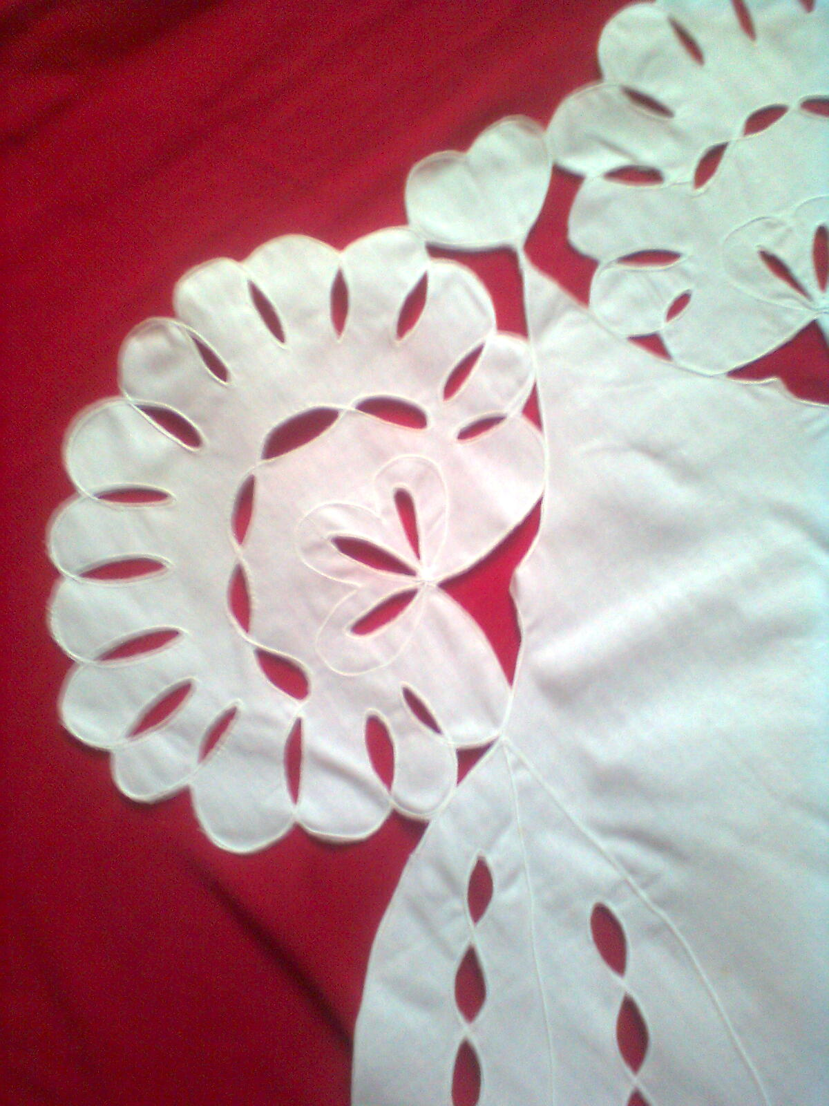 Fehér terítő egyik széle, gépi riseliő hímzésre előkészítve